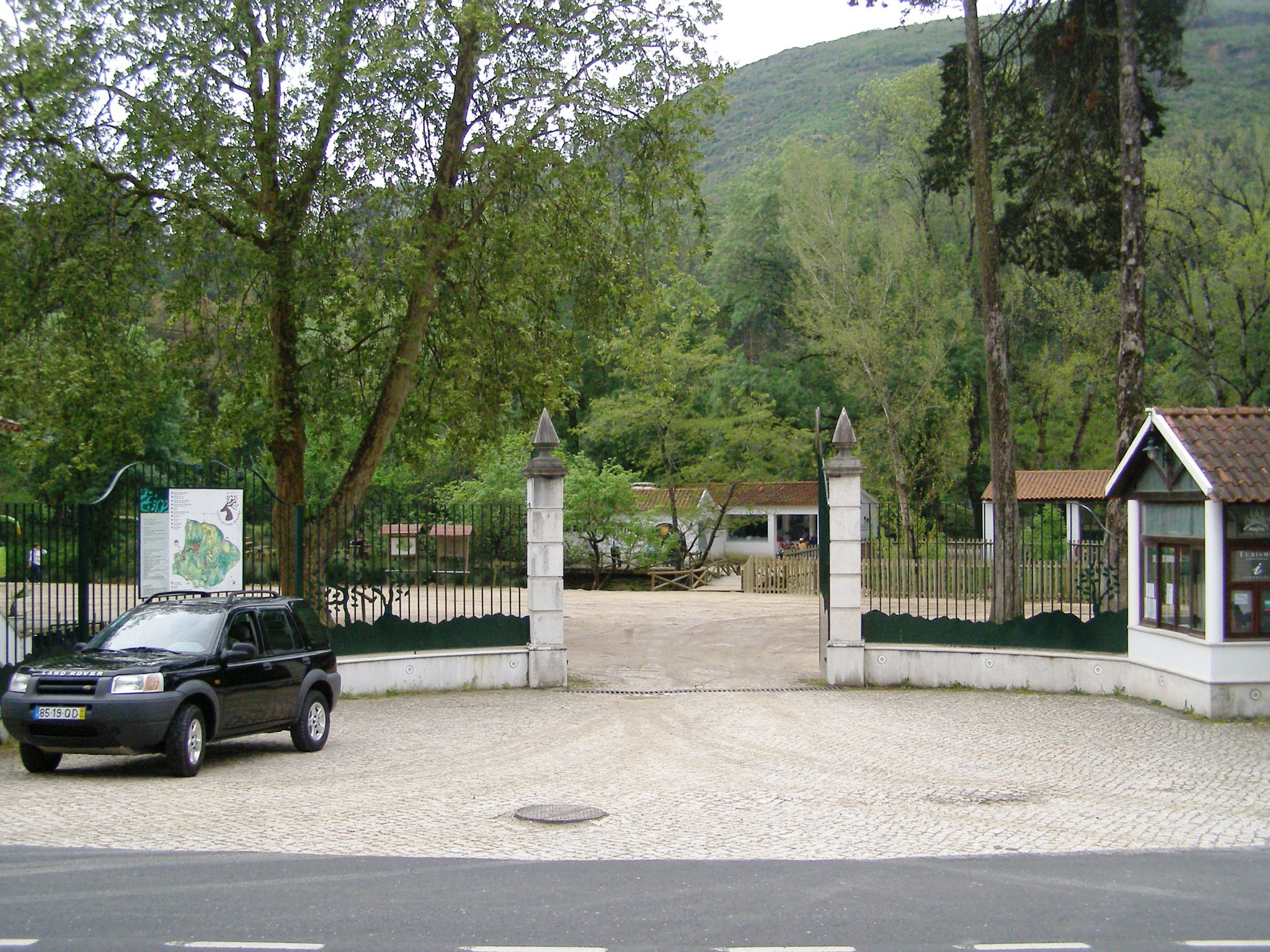 Porta do Codeçal, the main entrance to, Tapada Nacional de Mafra, Portugal.